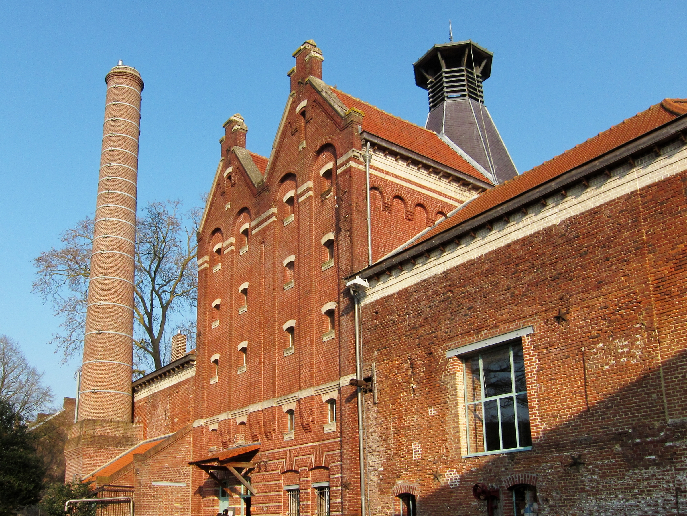 Ancienne brasserie du Cateau-Cambrésis.